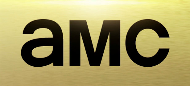 Logo von AMC